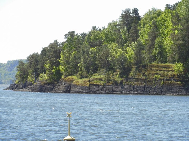 Killingholmen